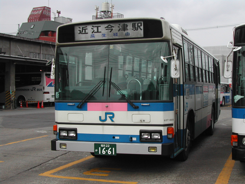 福井ナンバー 近江今津営業所にて、許可を得て撮影